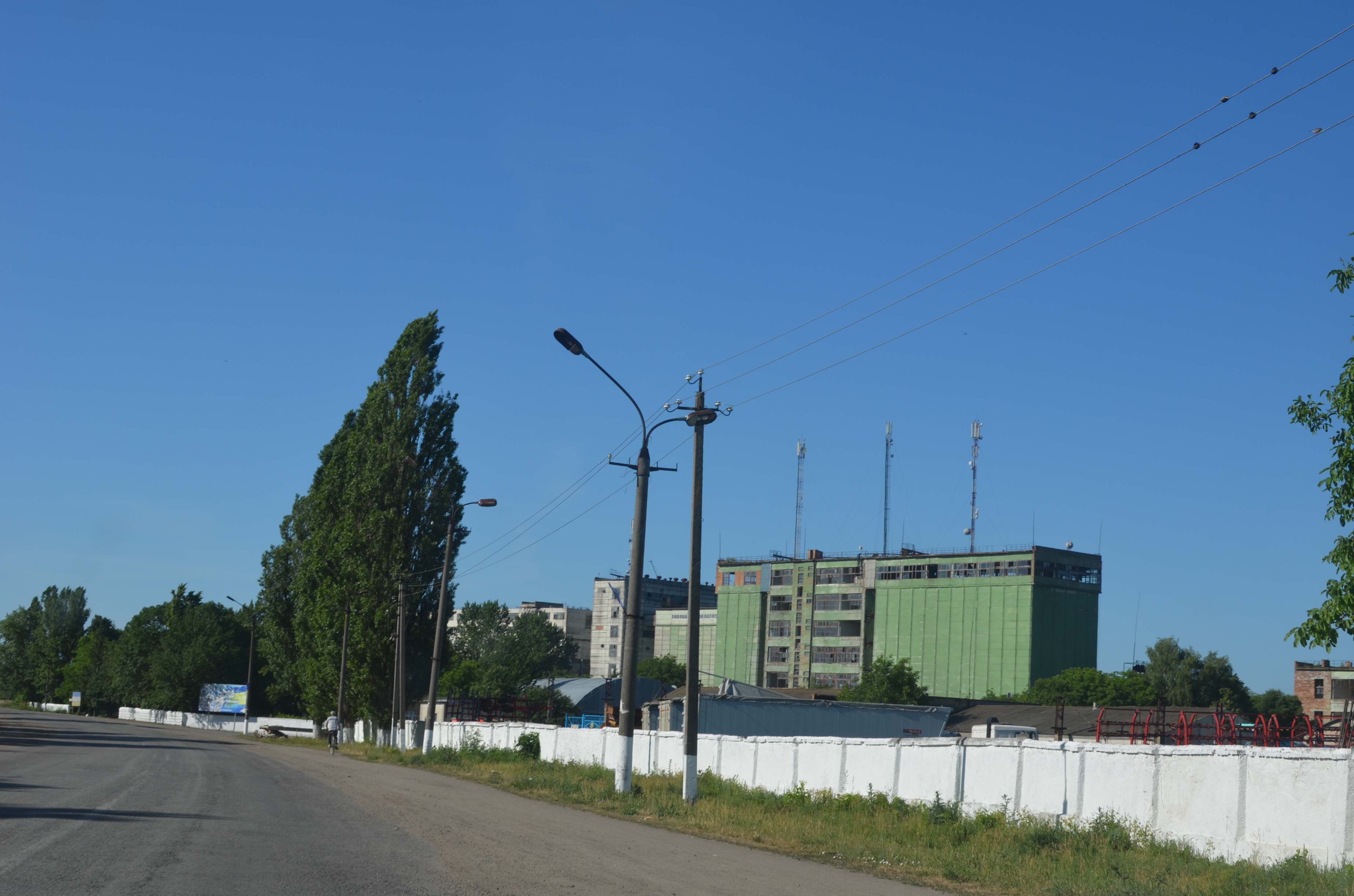 смт Вендичани.